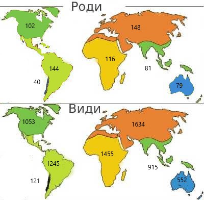 Мапа поширення ктирів за біогеографічними зонами